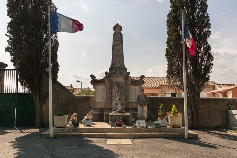 Monument aux morts - Archives départementales de l’Hérault - FRAD034-2458W-Bessan-00001